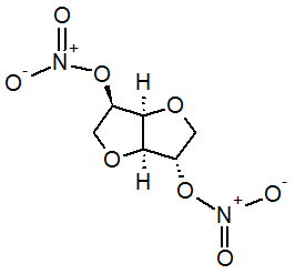 Isosorbiid dinitraadi struktuur